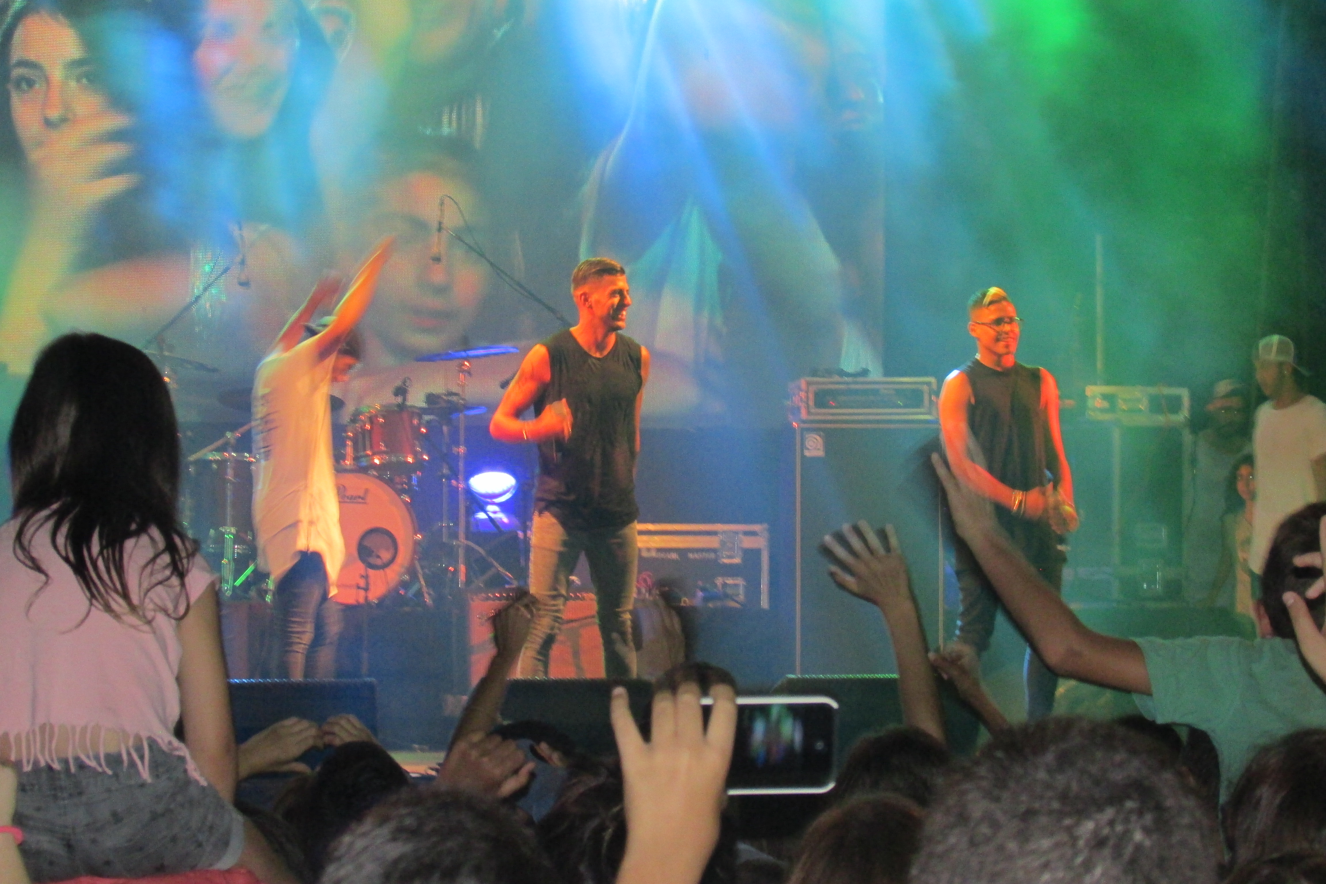 Static and Ben-El Tavori live at Kiriat Ata (30 August 2016)